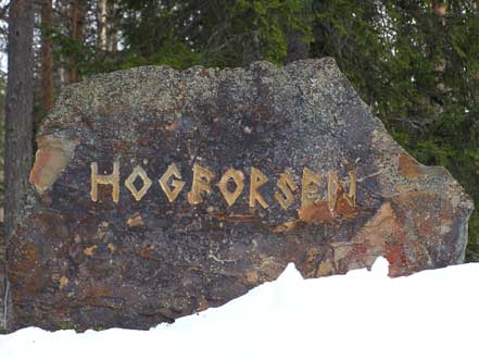 Från mina egna bilder. Fotograf: Tommy Halvarsson